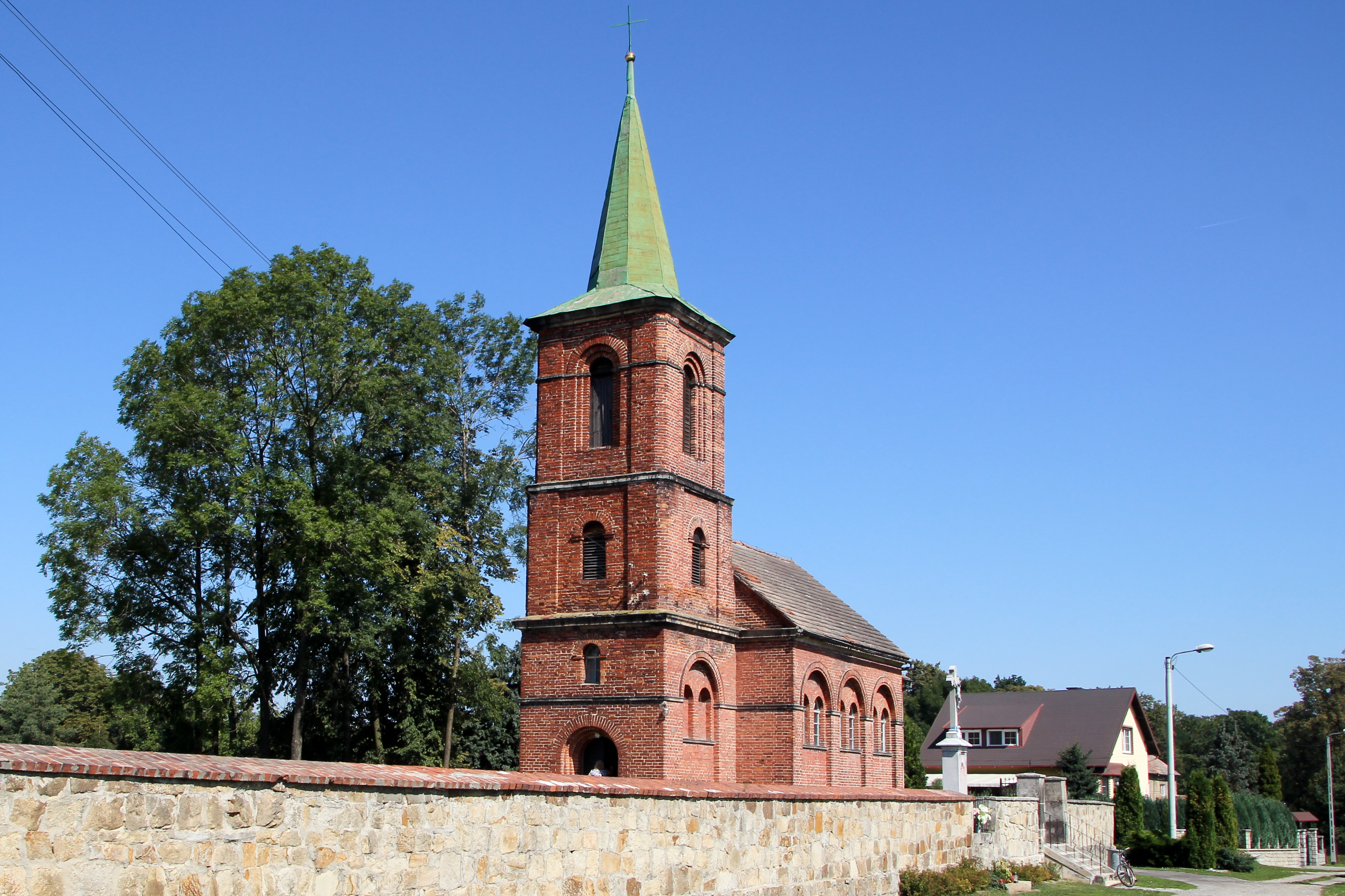 Kwiatków – rzymskokatolicki kościół filialny pw. św. Fabiana i Sebastiana, 1880